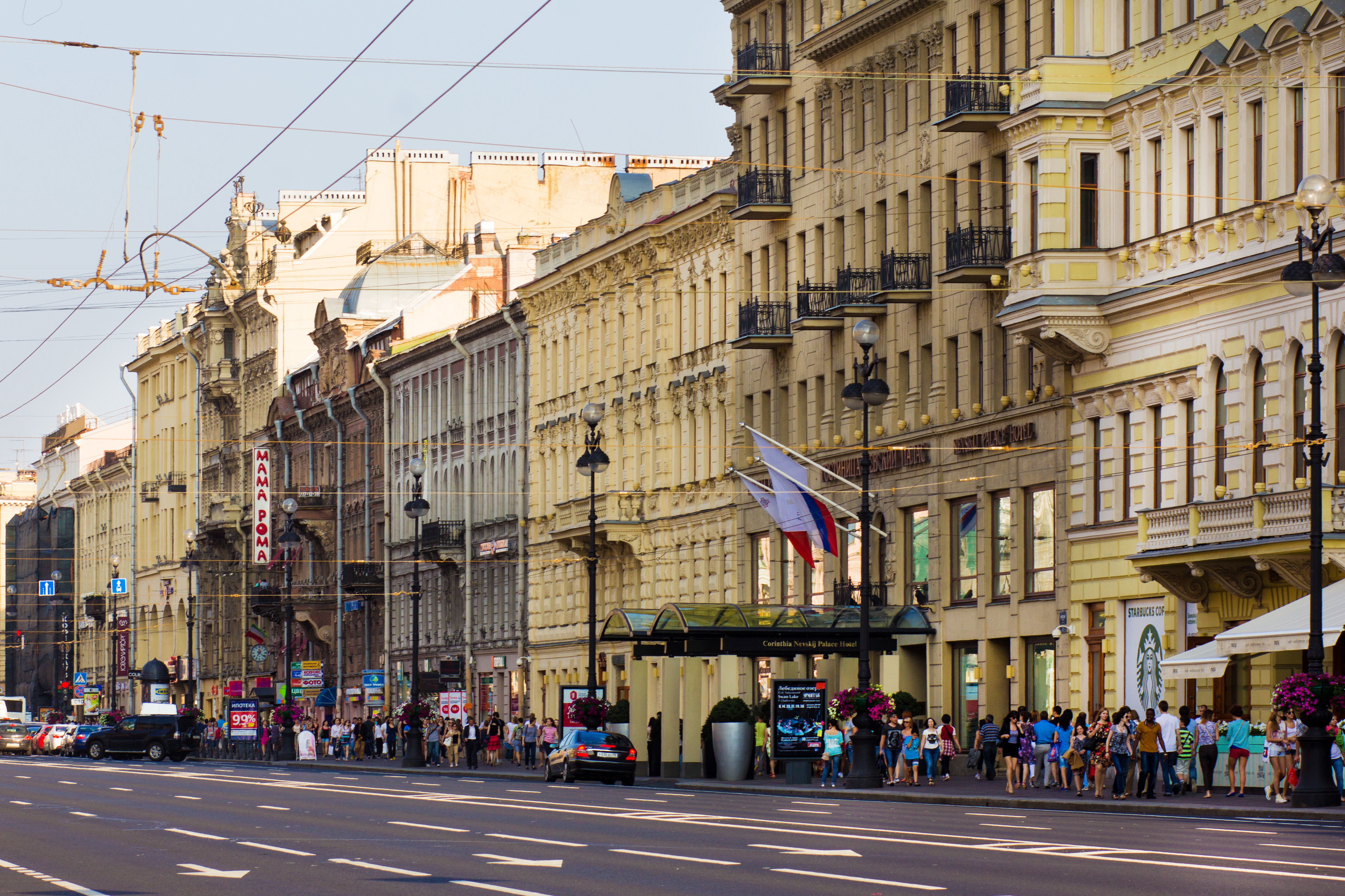 Nevskiy